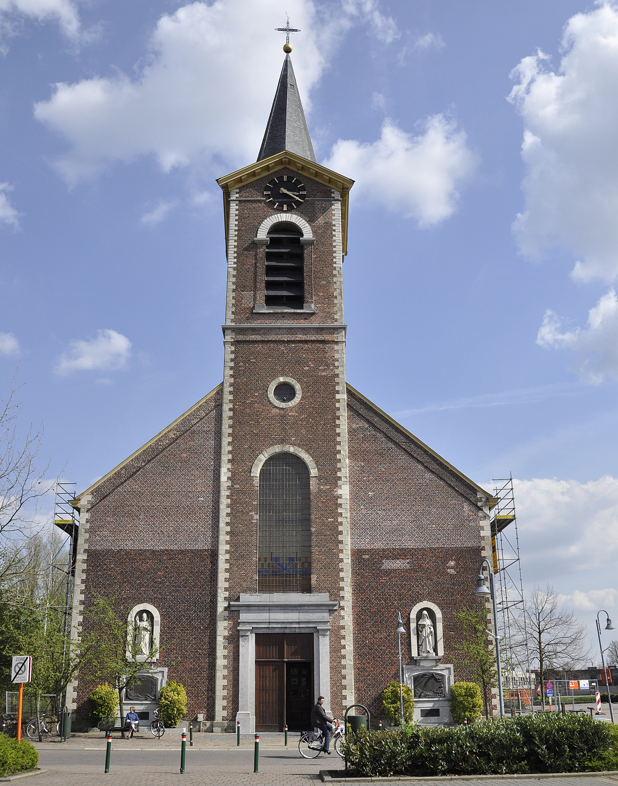 Sint-Martinuskerk (Melle) 9-04-2010 14-22-01